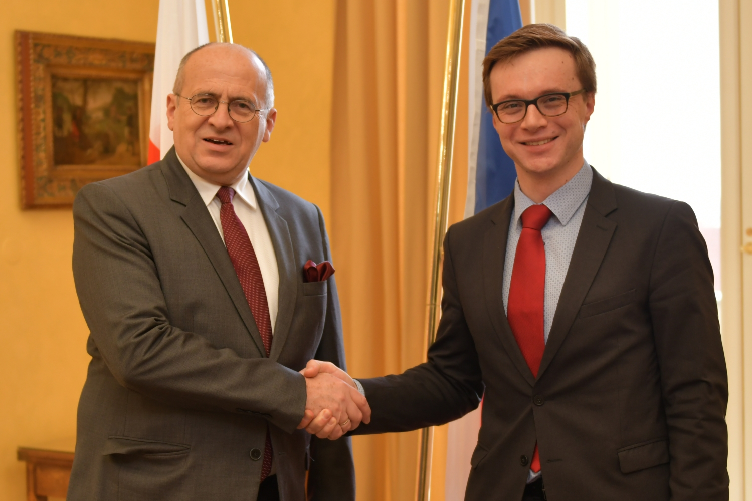 Zbigniew Rau, Aleš Chmelař